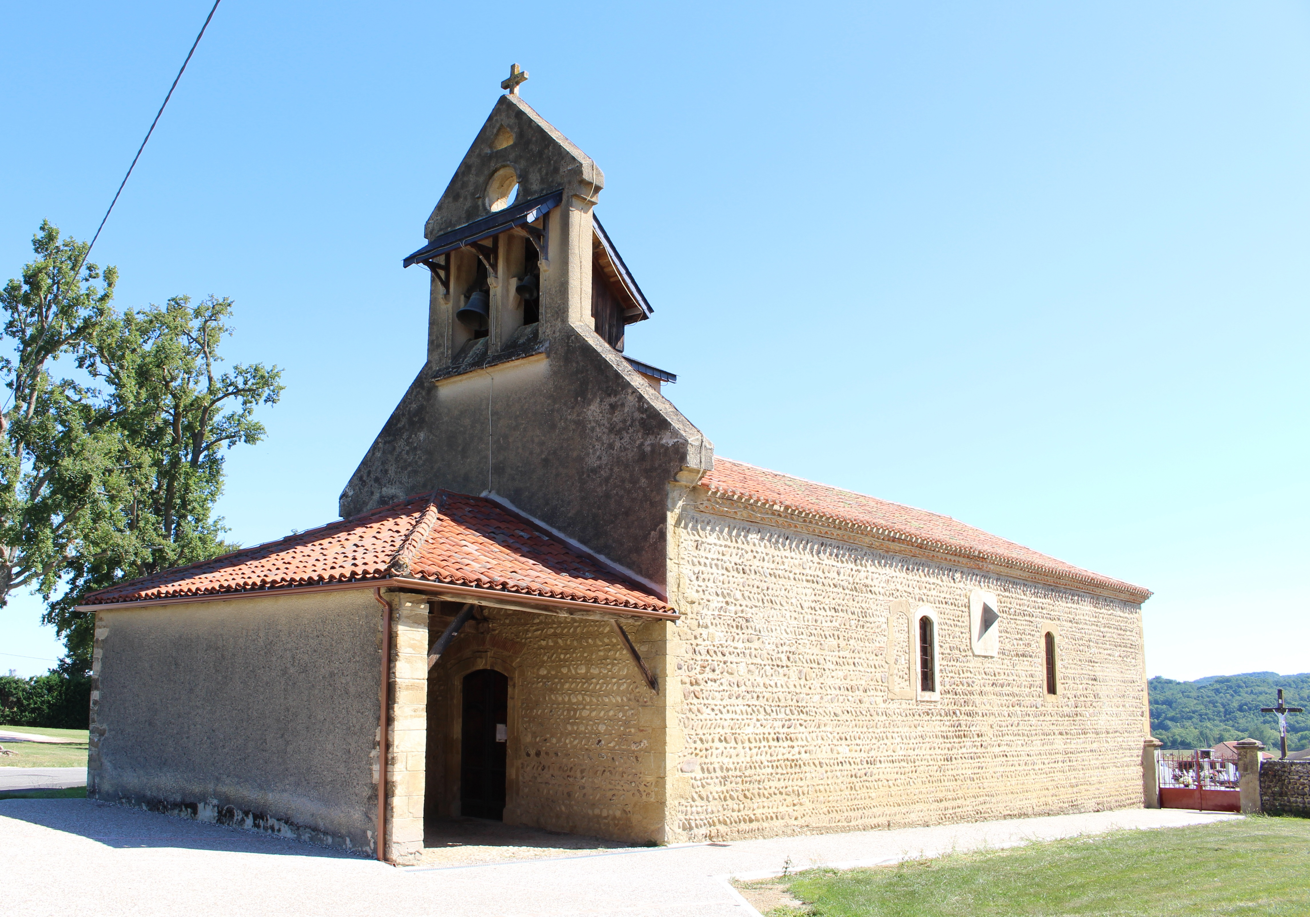 Église Saint-Michel de Laran (Hautes-Pyrénées)